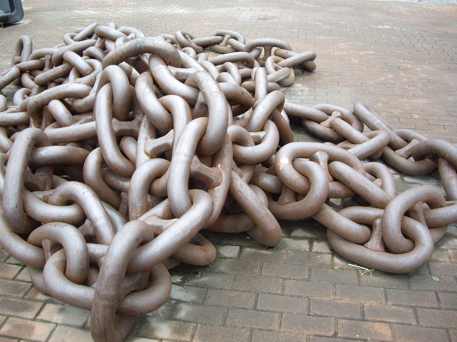 cadena de barco